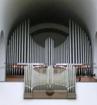 Orgel der Katholischen Kirche Maria, Hilfe der Christen in Berlin-Spandau